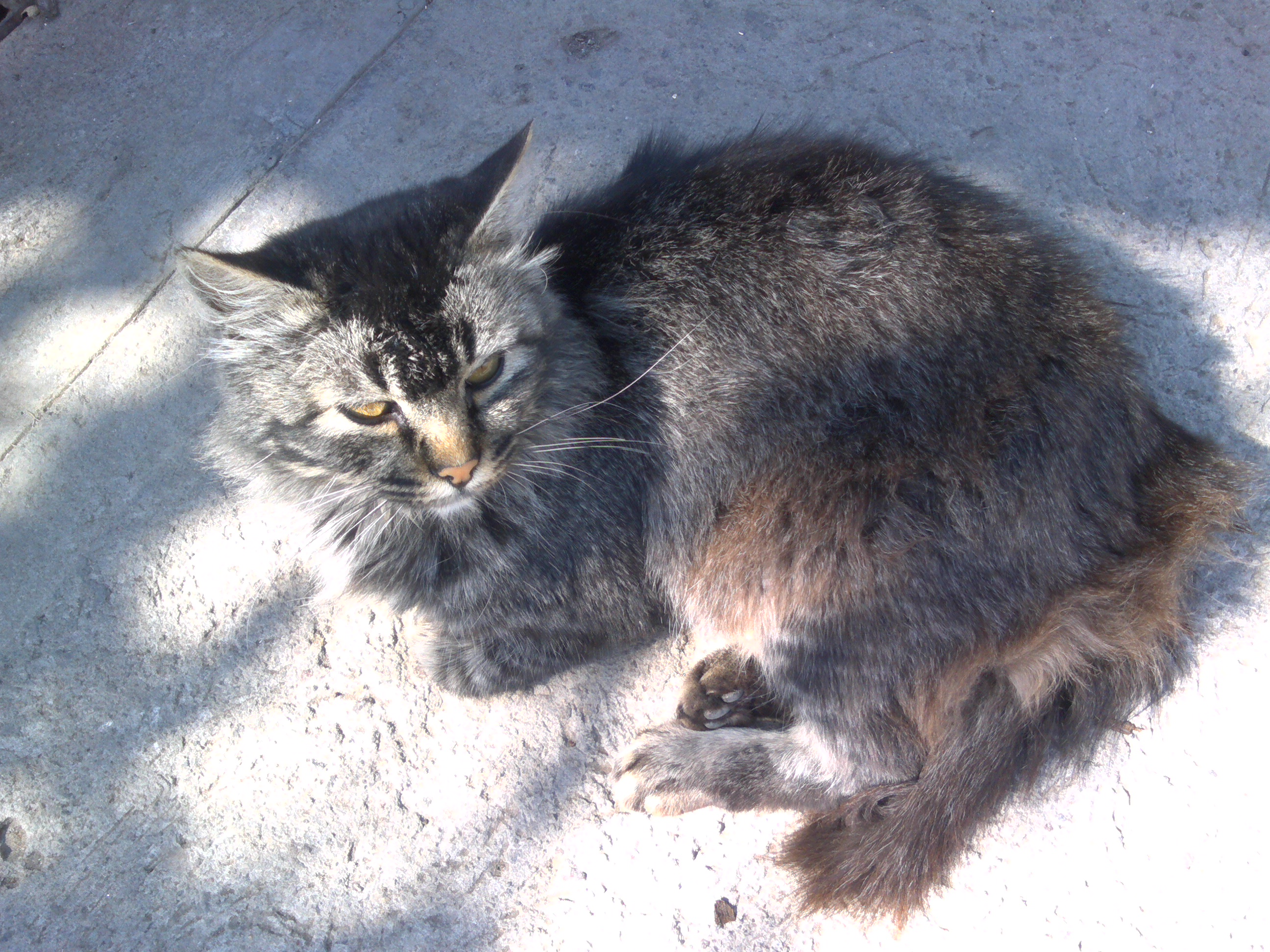 Este es mi gato